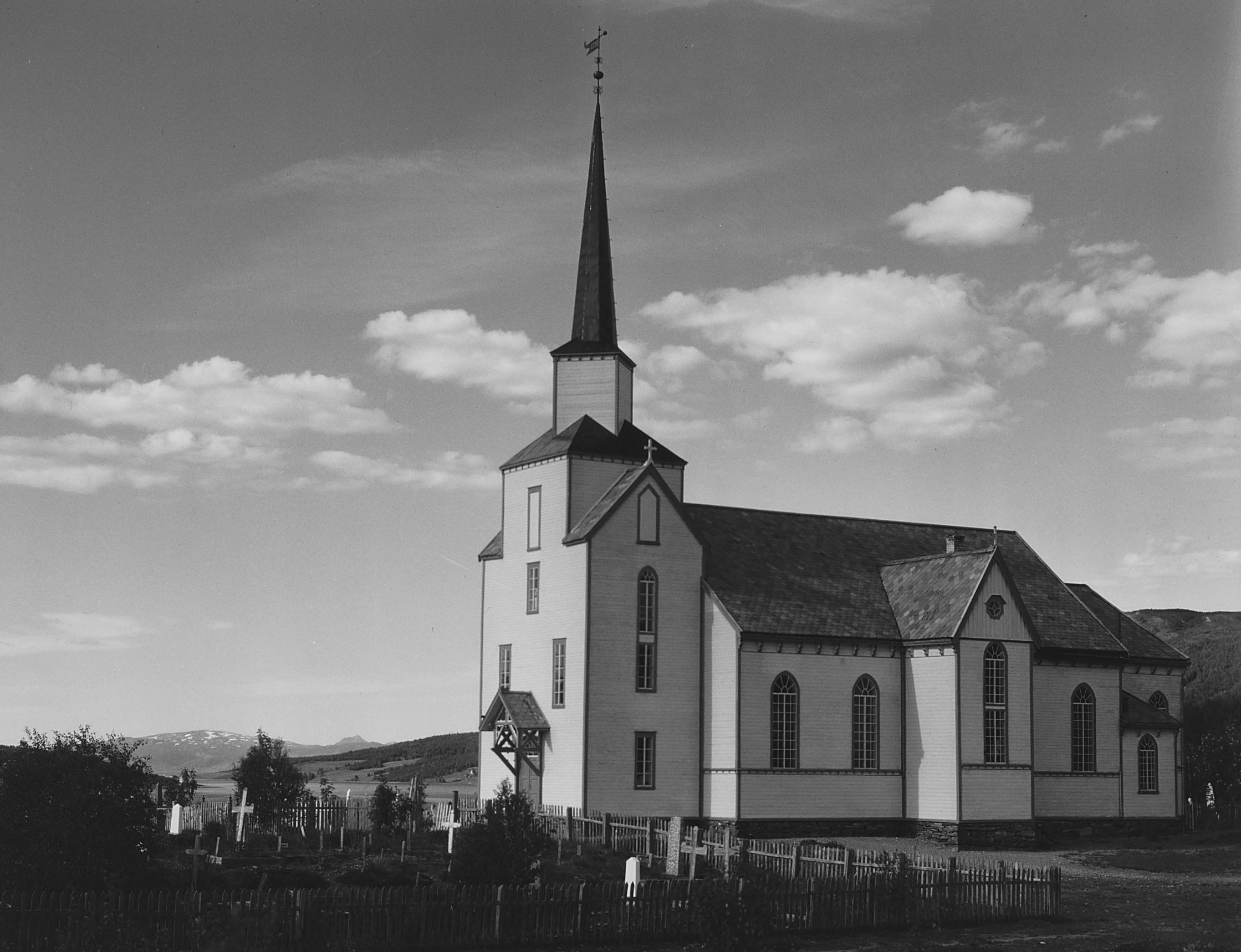 Lenvik kirke fotografert av Anders Beer Wilse 1. juli 1928. Fra Nasjoanbibliotekets samling